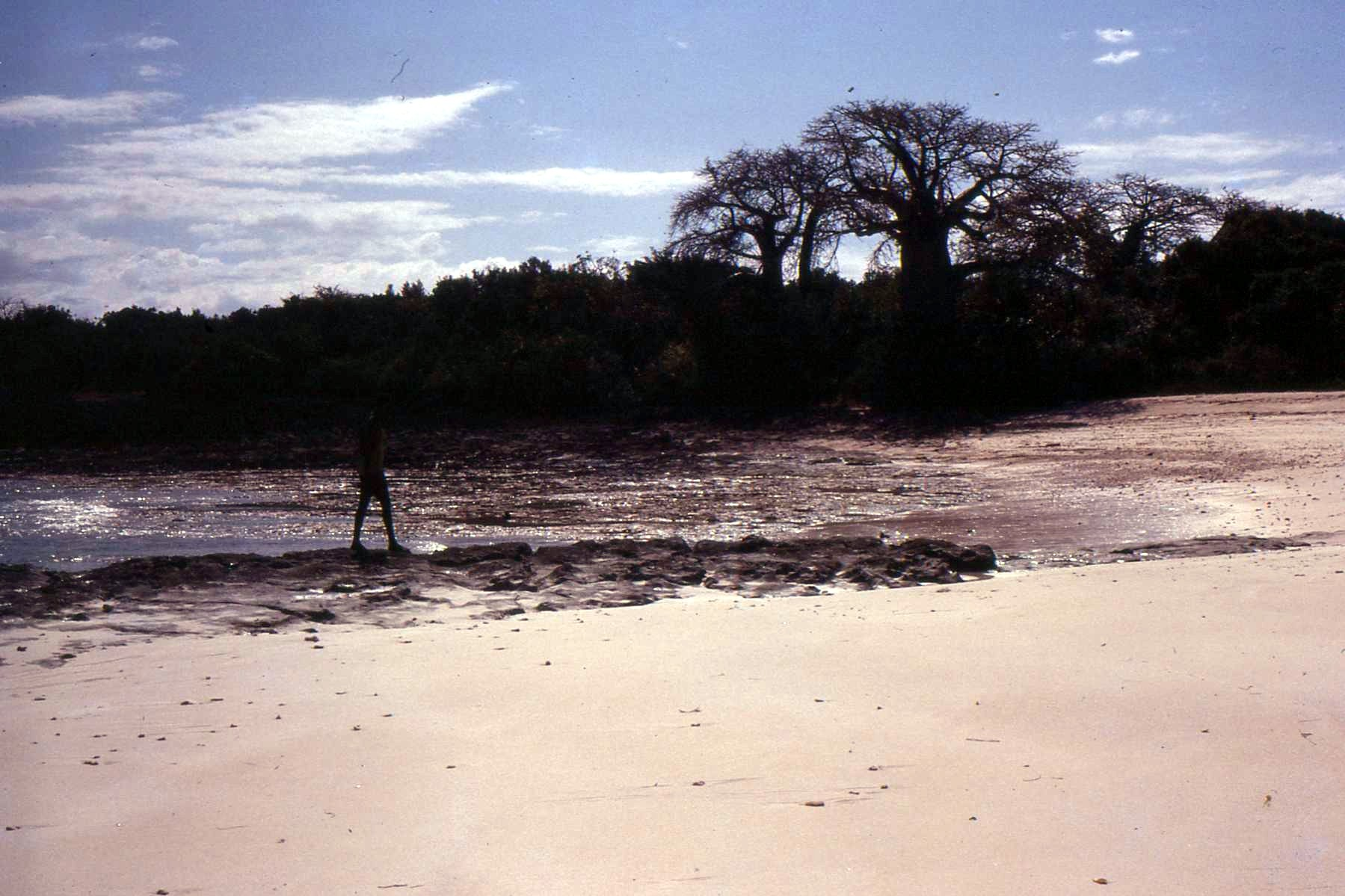 Bongoyo island